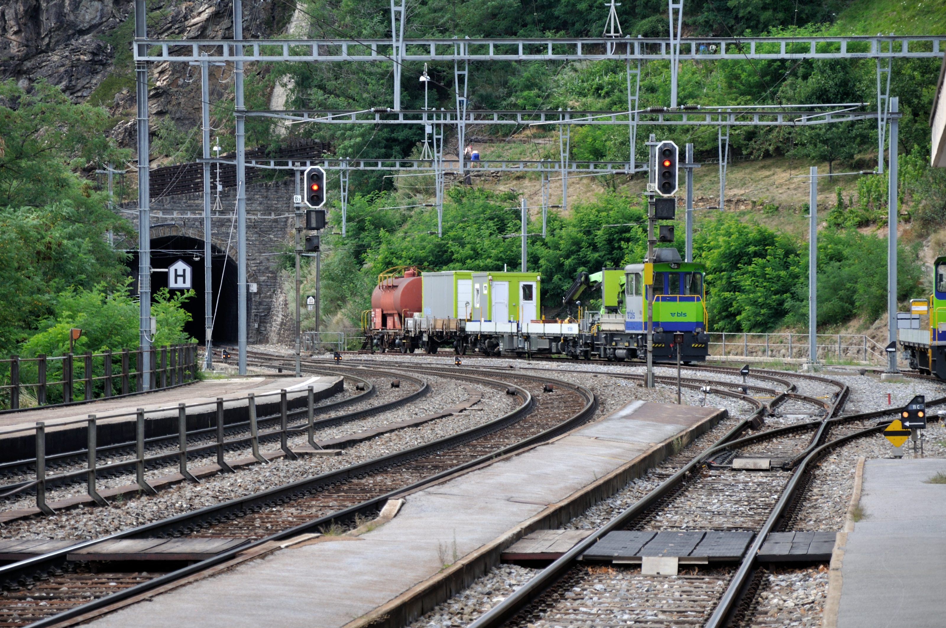 Switzerland, Valais, hike on Lötschberg Südrampe